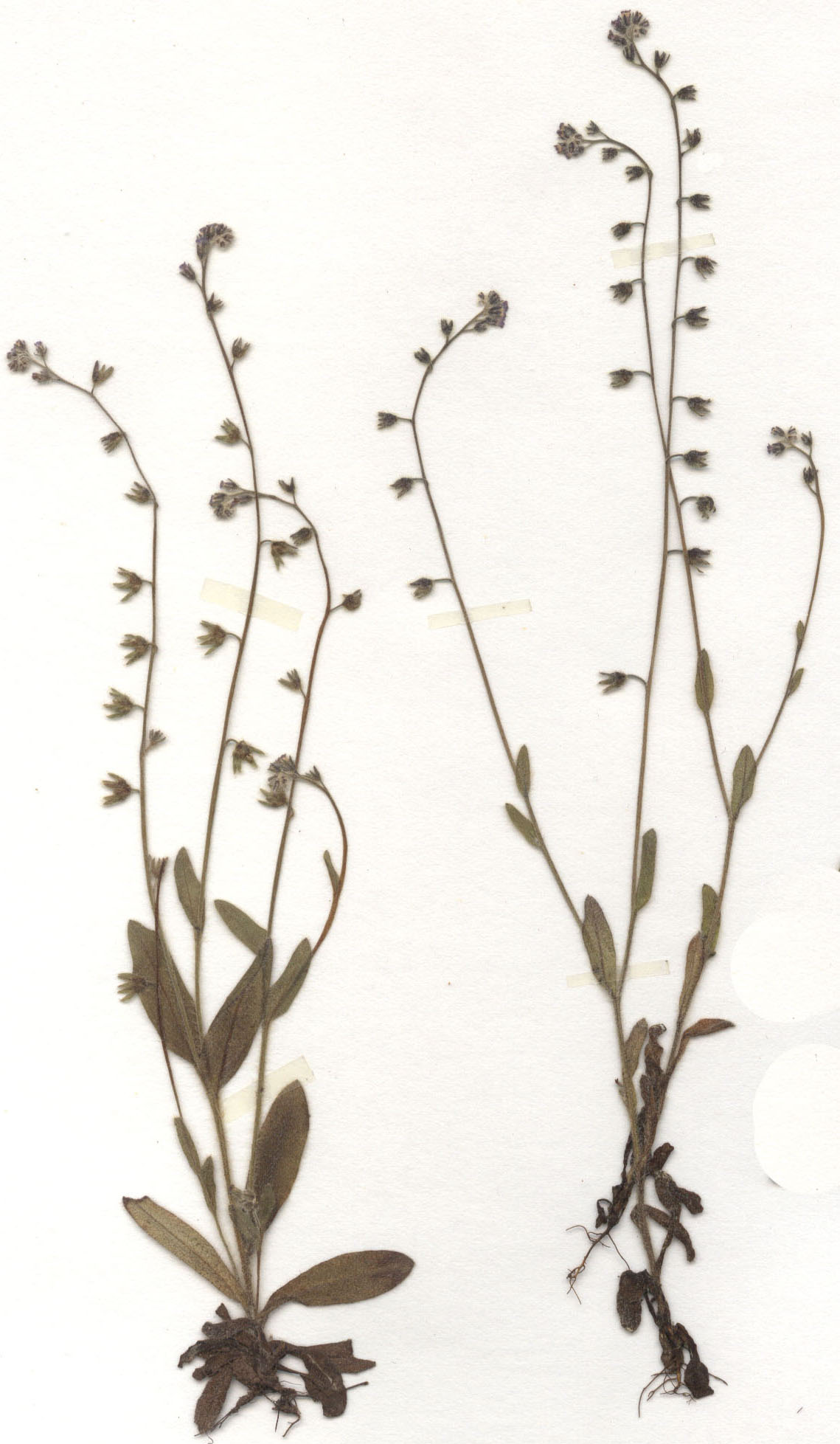 Myosotis ramosissima, eigener Herbarbeleg von 1980, Unterfranken